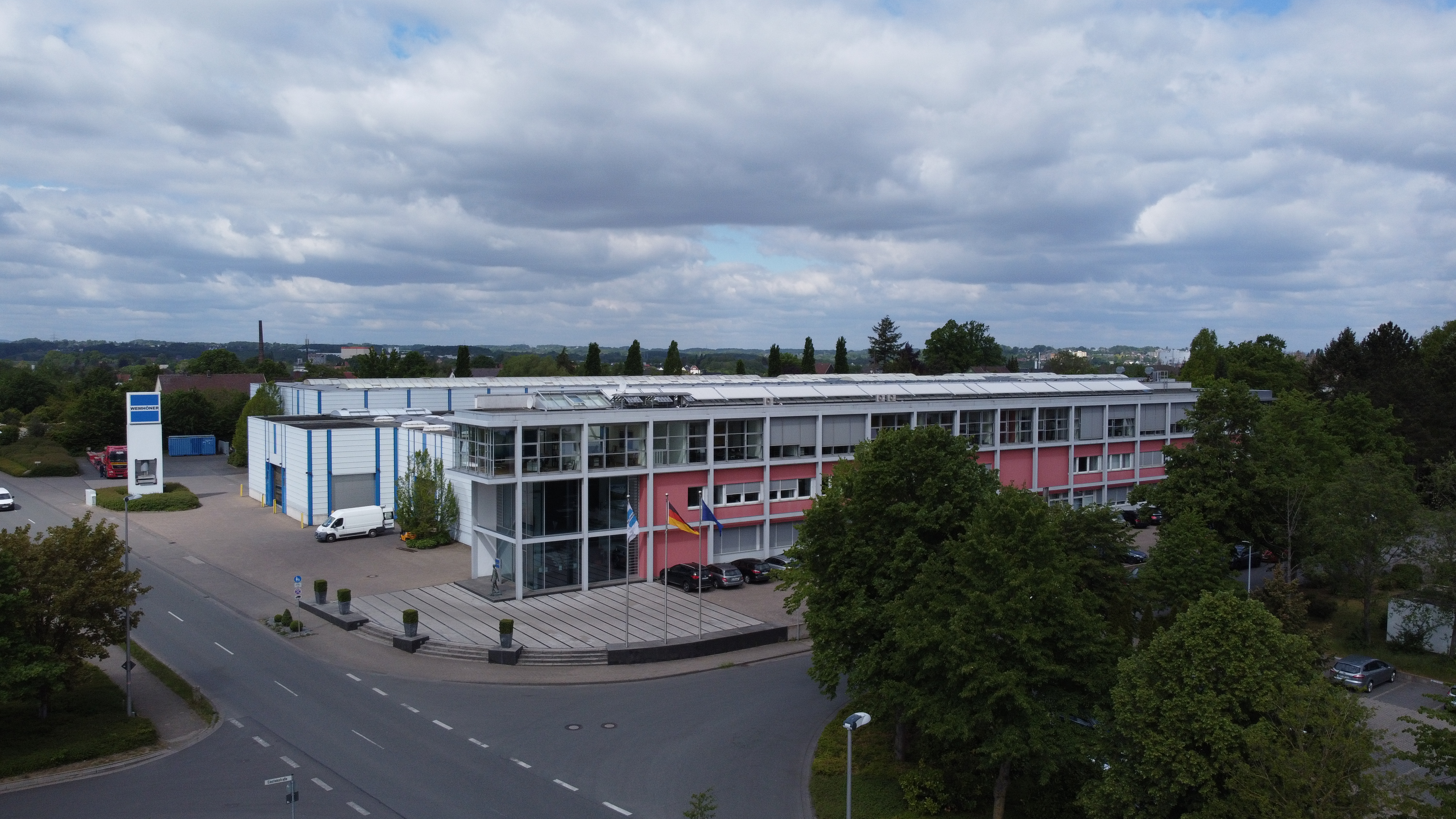 Wemhöner Verwaltung Herford als Luftbild mit Drohne aufgenommen